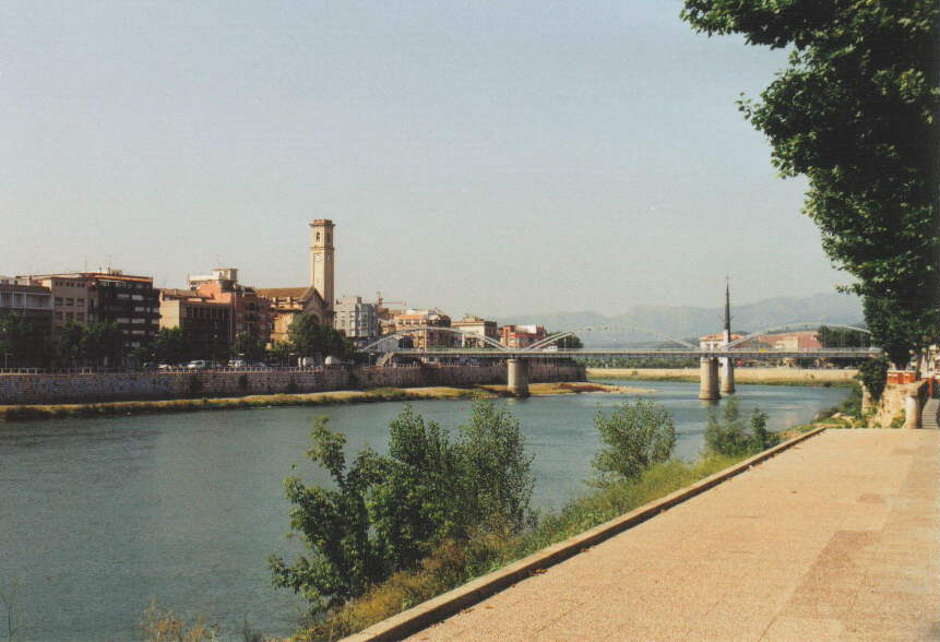 Straßenbrücke in Tortosa, die das westliche Ufer (links) mit dem östlichen Ufer des Ebro verbindet (25. Juni 2002).